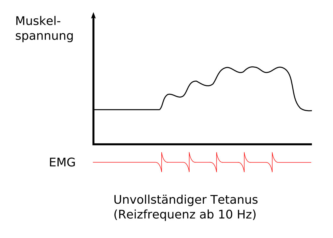 Muskulatur: unvollstaendiger Tetanus